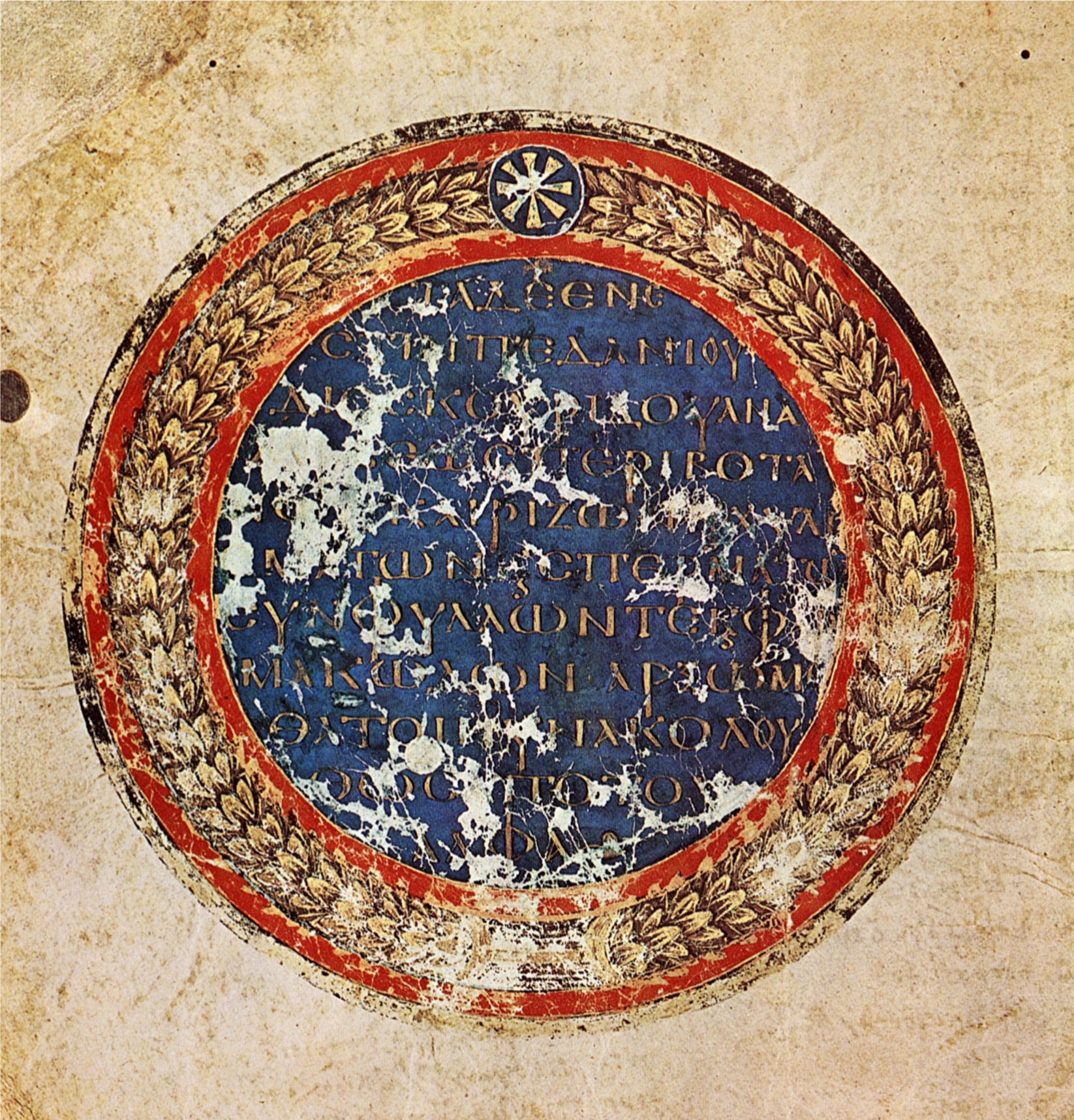 Ziertitel mit griechischen Majuskelbuchstaben im Wiener Dioskurides (fol 7 verso). Die deutsche Übersetzung lautet: Hier enthalten ist das Werk des Pedanios Dioskurides aus Anazarbos über die Pflanzen, Wurzeln, Säfte und Samen, zugleich die Blätter und Heilmittel. Beginnen wir daher der Reihe nach mit dem Buchstaben Alpha[1]